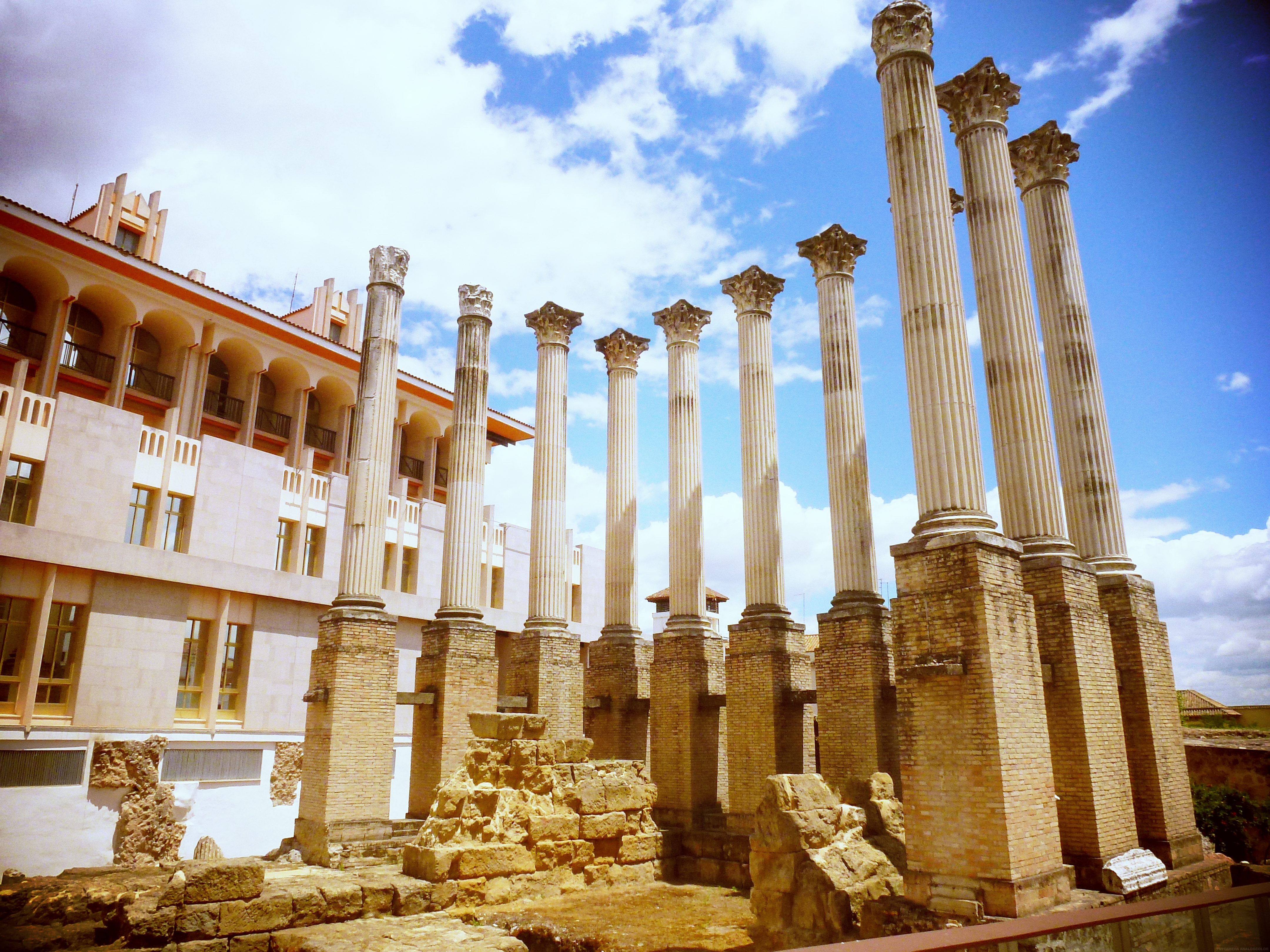 Templo romano de Córdoba (España).